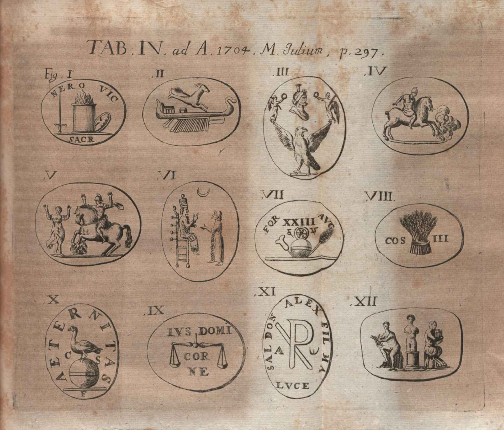 Illustration